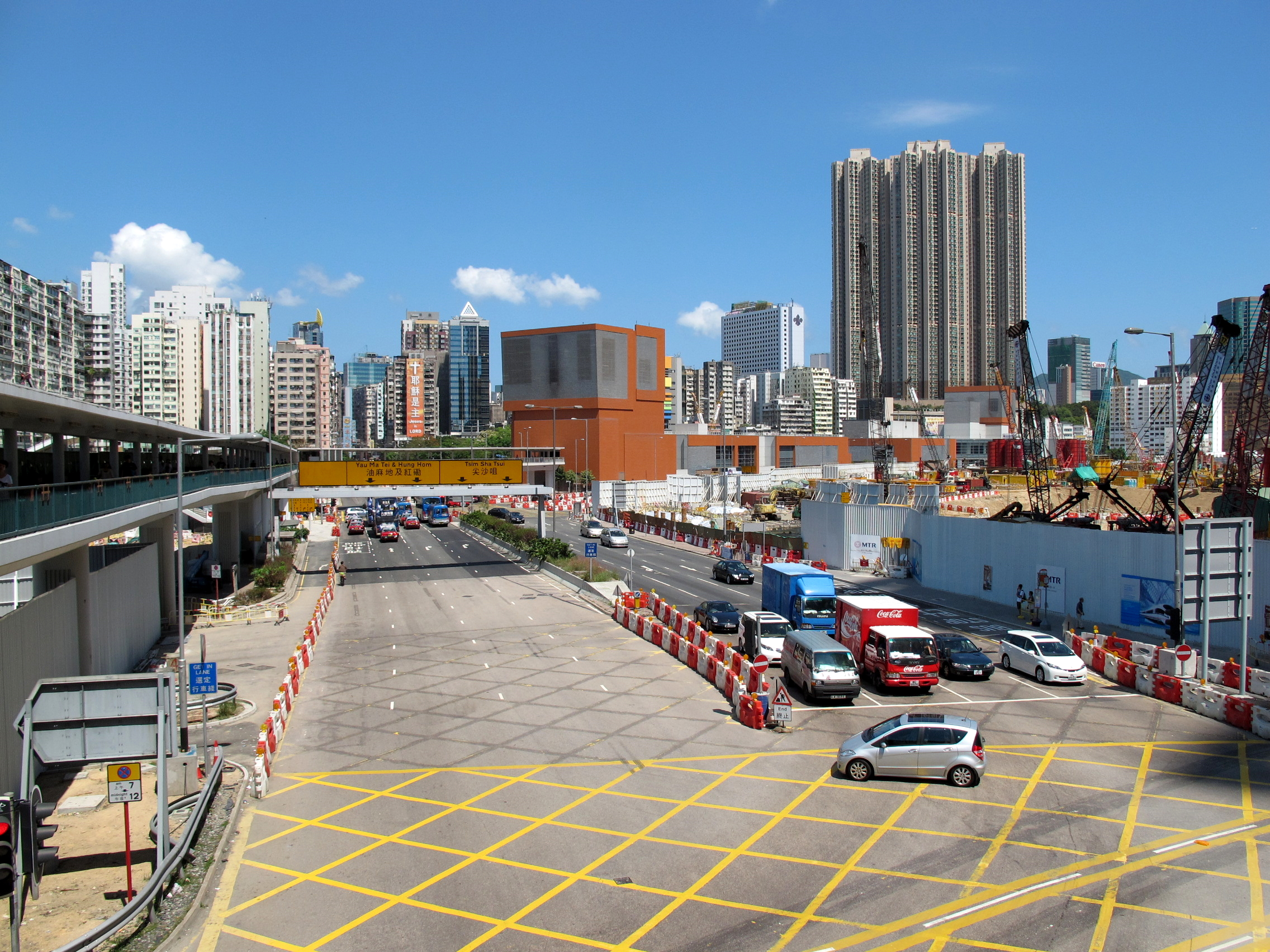 Jordan Road 佐敦道